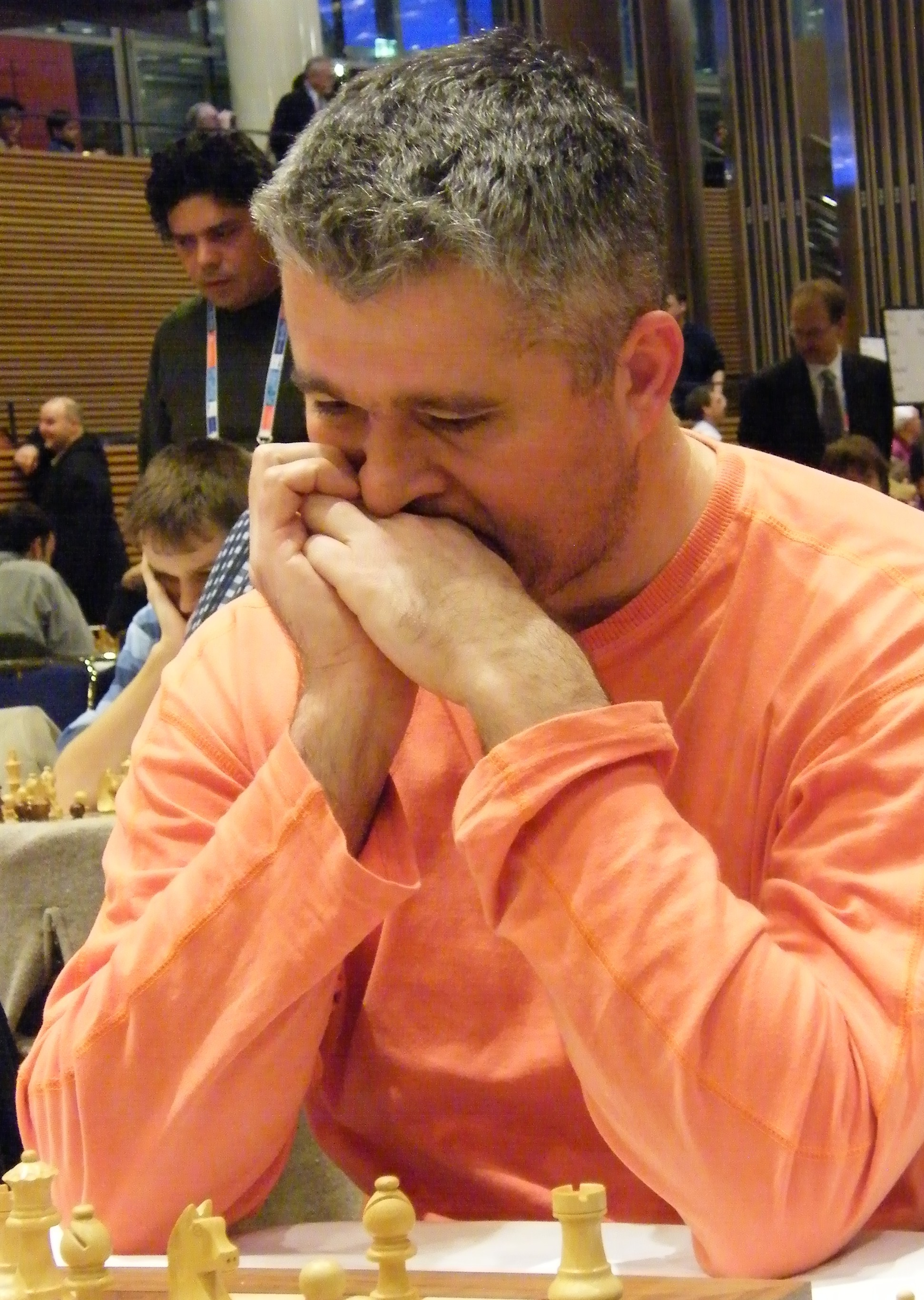 Dragisa Blagojevic bei der Schacholympiade 2008 in Dresden